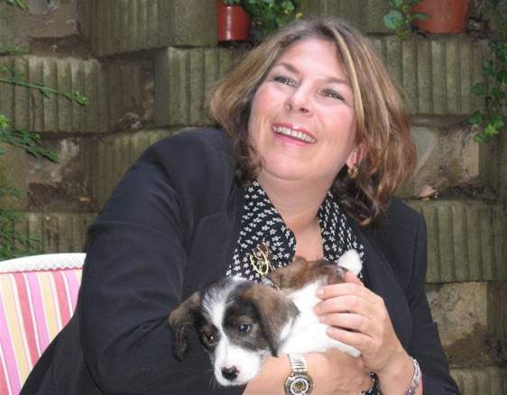 Andrea Kdolsky als Prominente für "Impfen für Afrika"